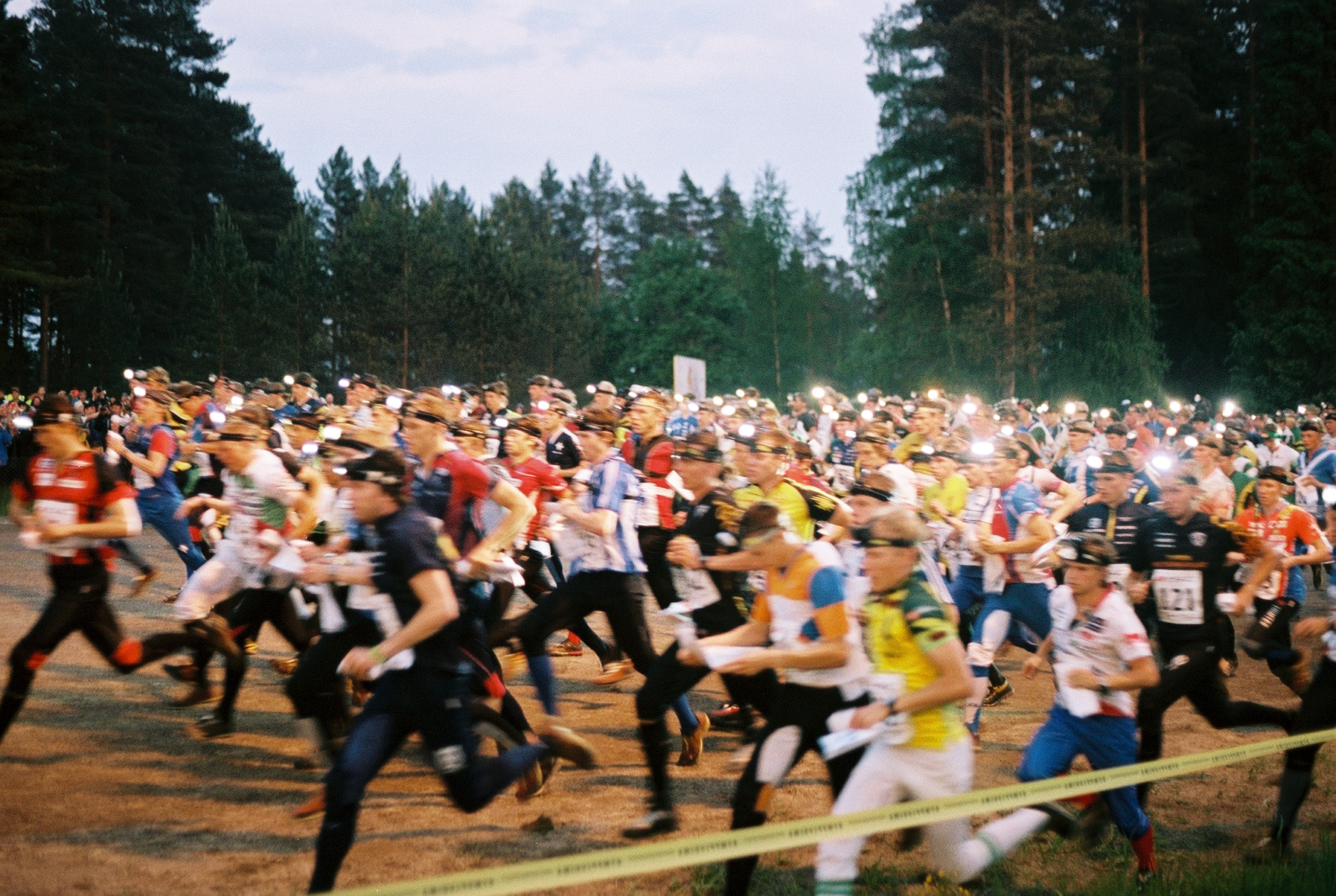 Orienteering relay Jukola night